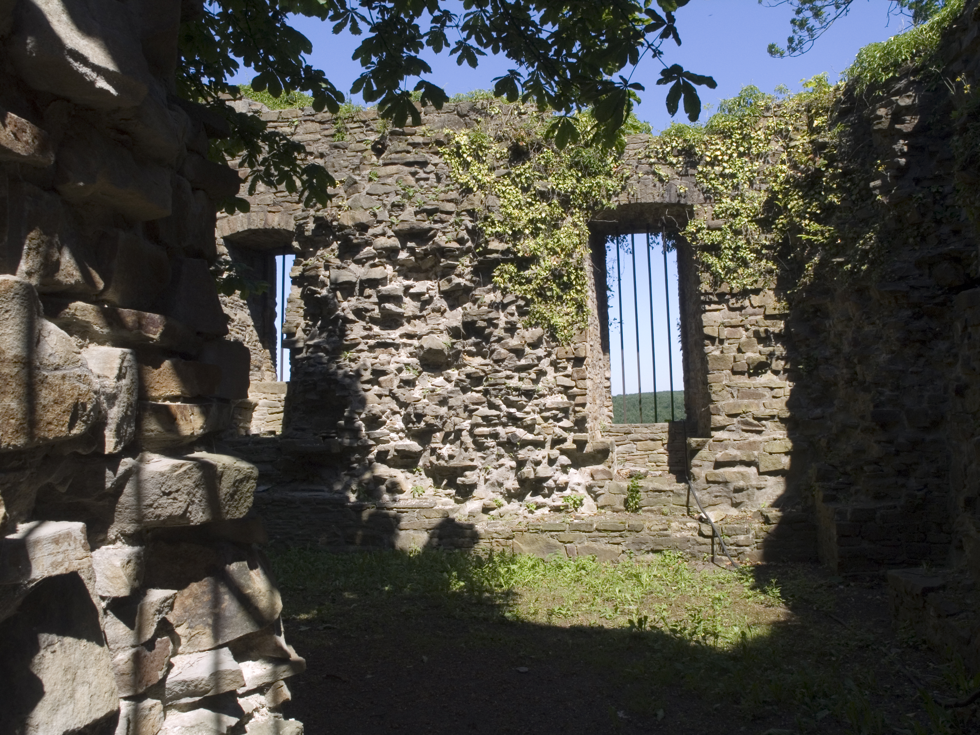 Северный Рейн - Вестфалия, Веттер (Рур) - крепость Бург Веттер